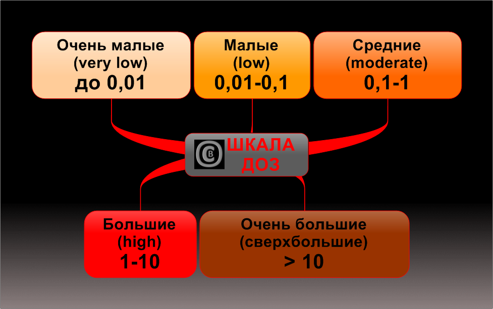 Шкала доз в радиобиологии (в Гр) Интерактивная шкала доз